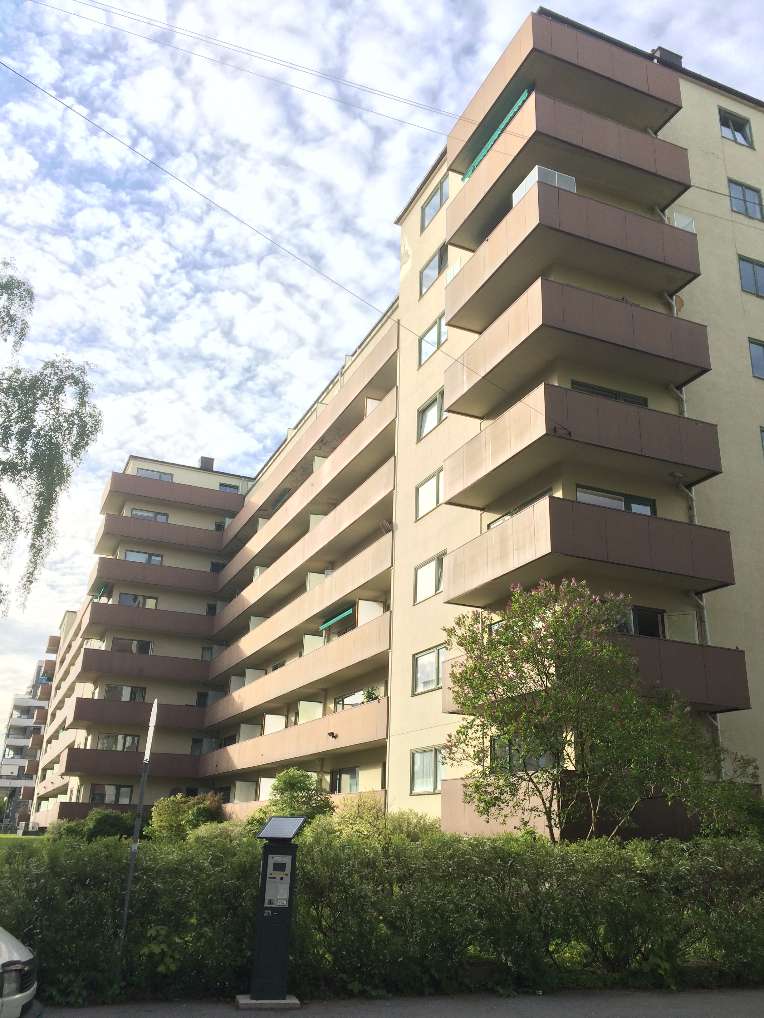 Gardeveien 2. Arkitekt: Ulf Berbom (1938). Listeført.